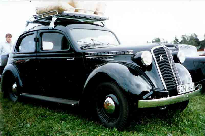 Volvo PV51 4-Door Sedan 1937